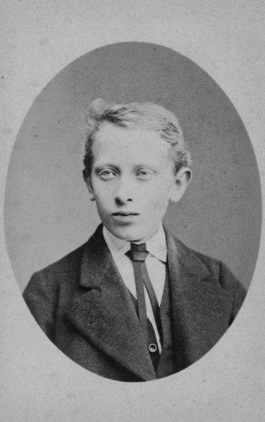 Adolf Oppermann 1877